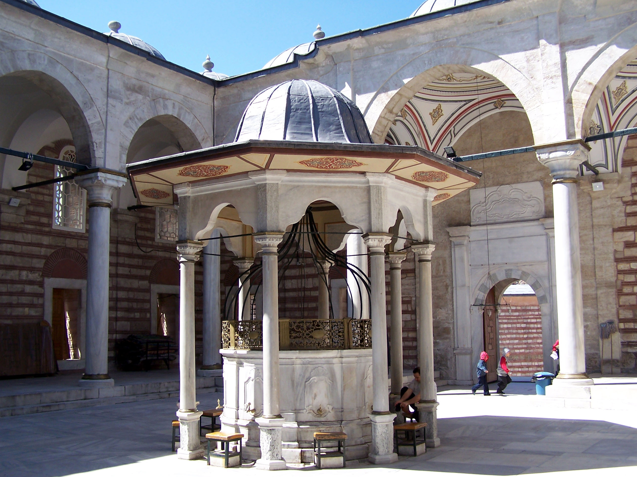 Şadırvan of Laleli Camii in Laleli.